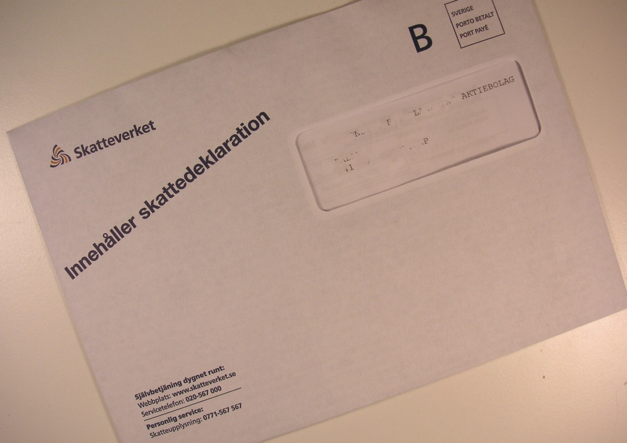 Ett (harmlöst) brev från Skatteverket